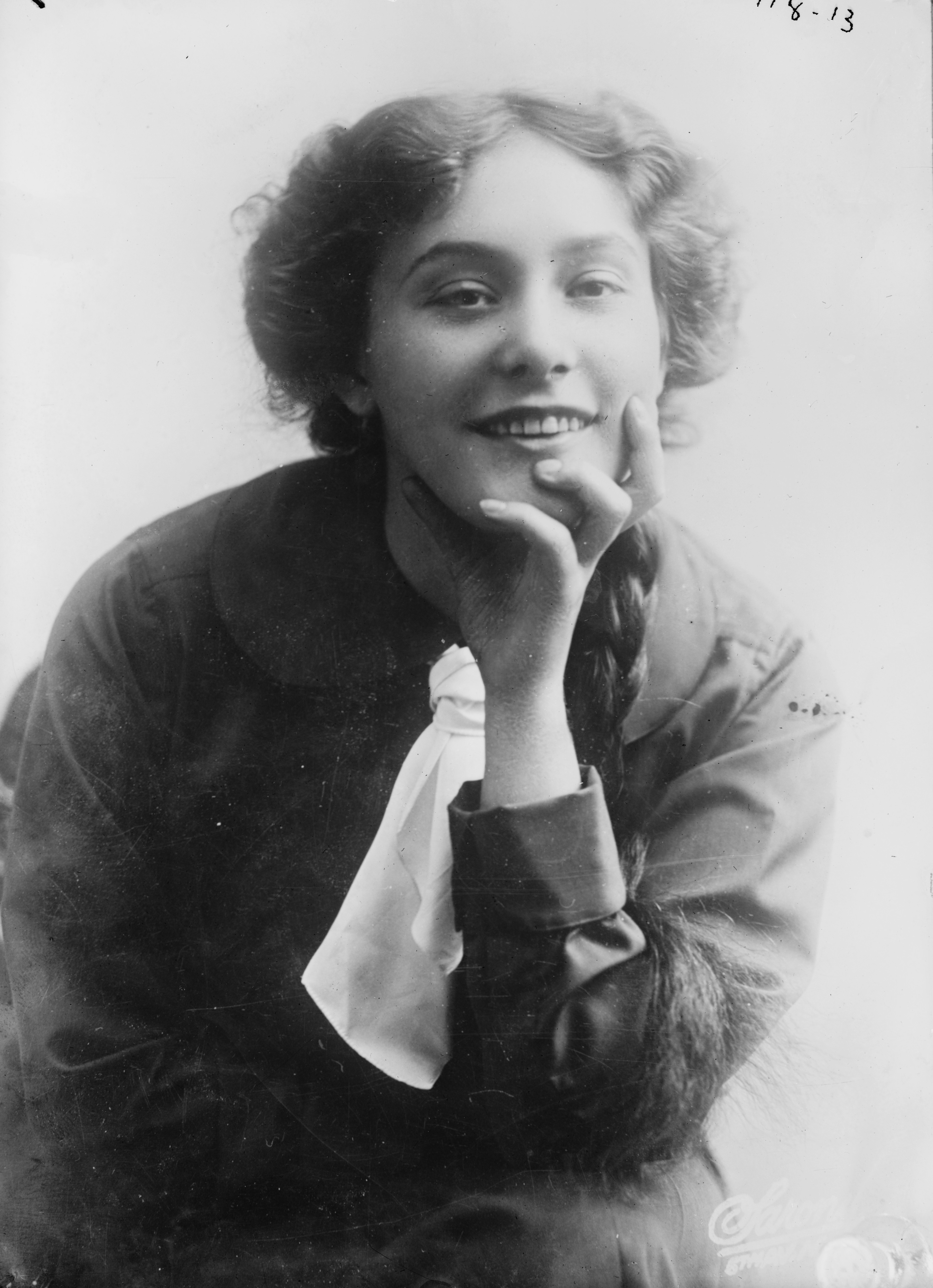 Actor Elsie Ferguson